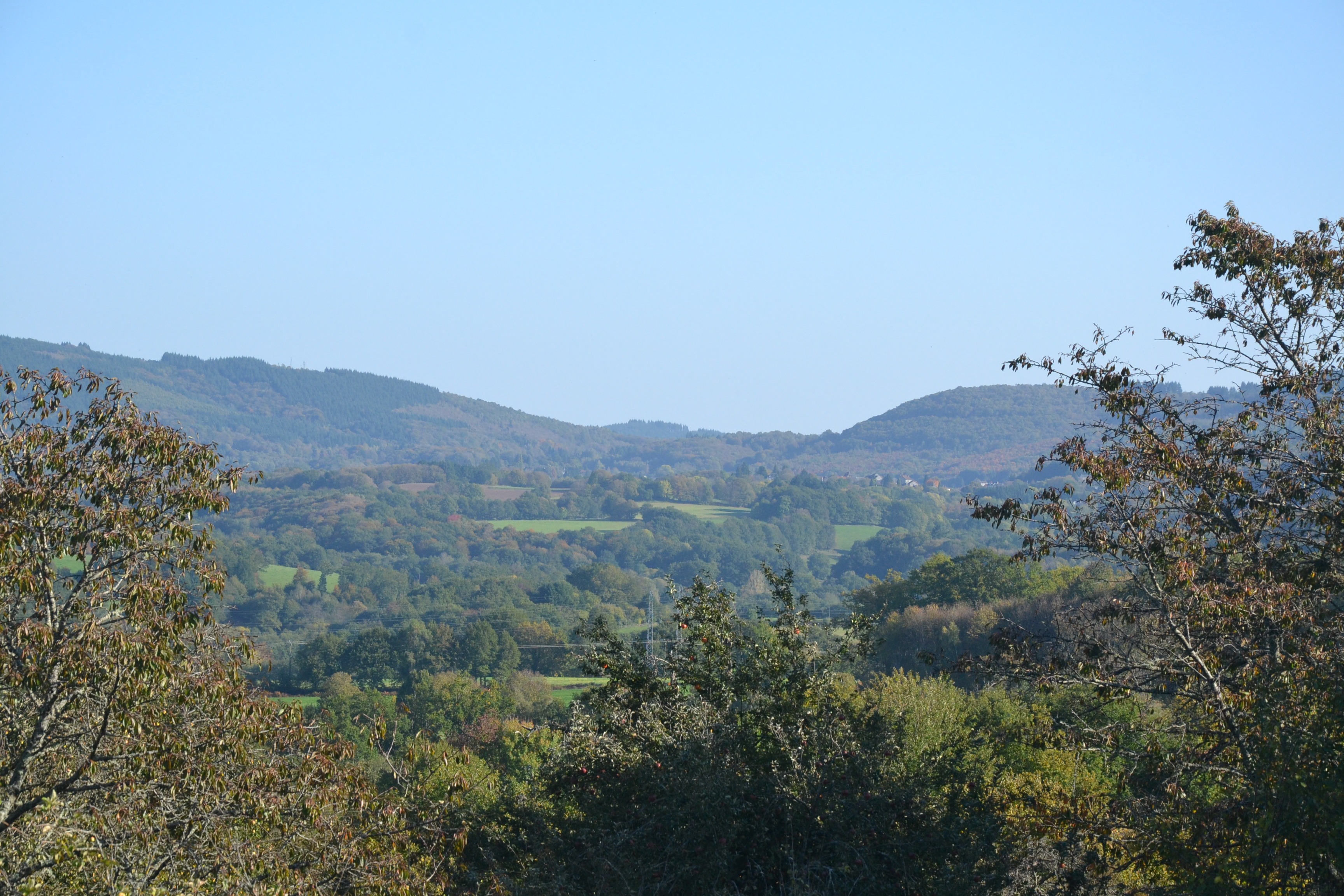 Vue sur le col de la Roche et les monts d'Ambazac depuis Bersac-sur-Rivalier (Haute-Vienne, France).